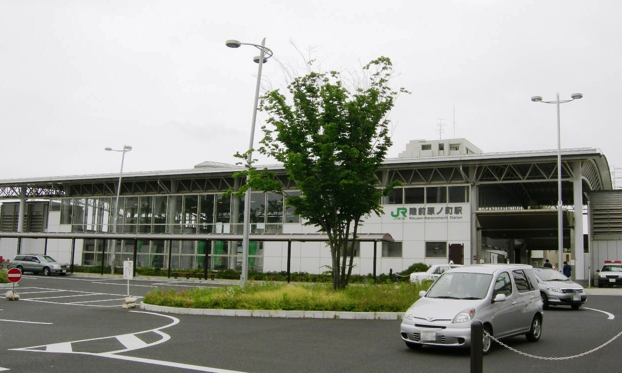 JR仙石線（JR senseki line）陸前原ノ町駅（Rikuzen-Haranomachi station）駅舎